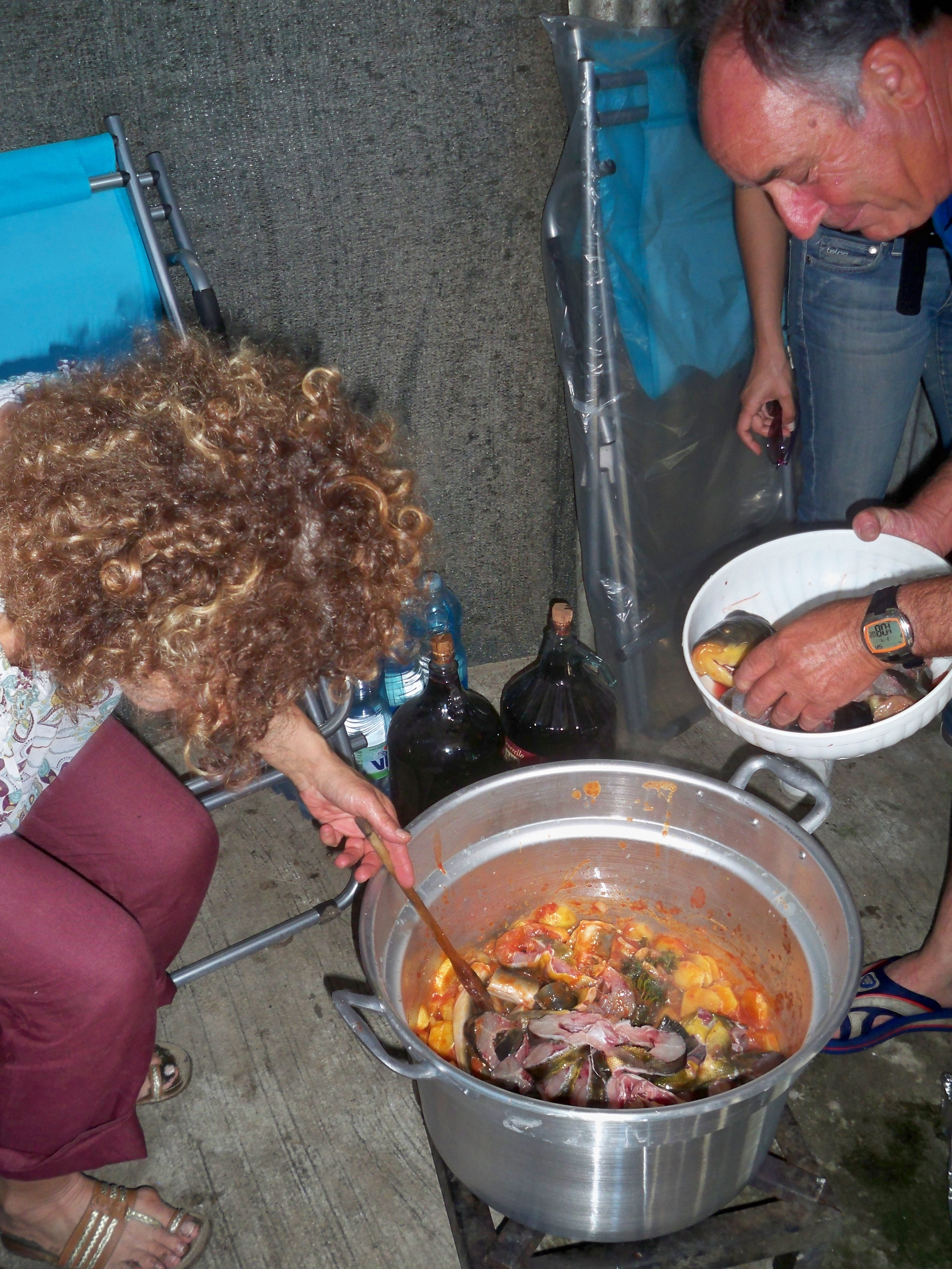 preparazione della sbricia